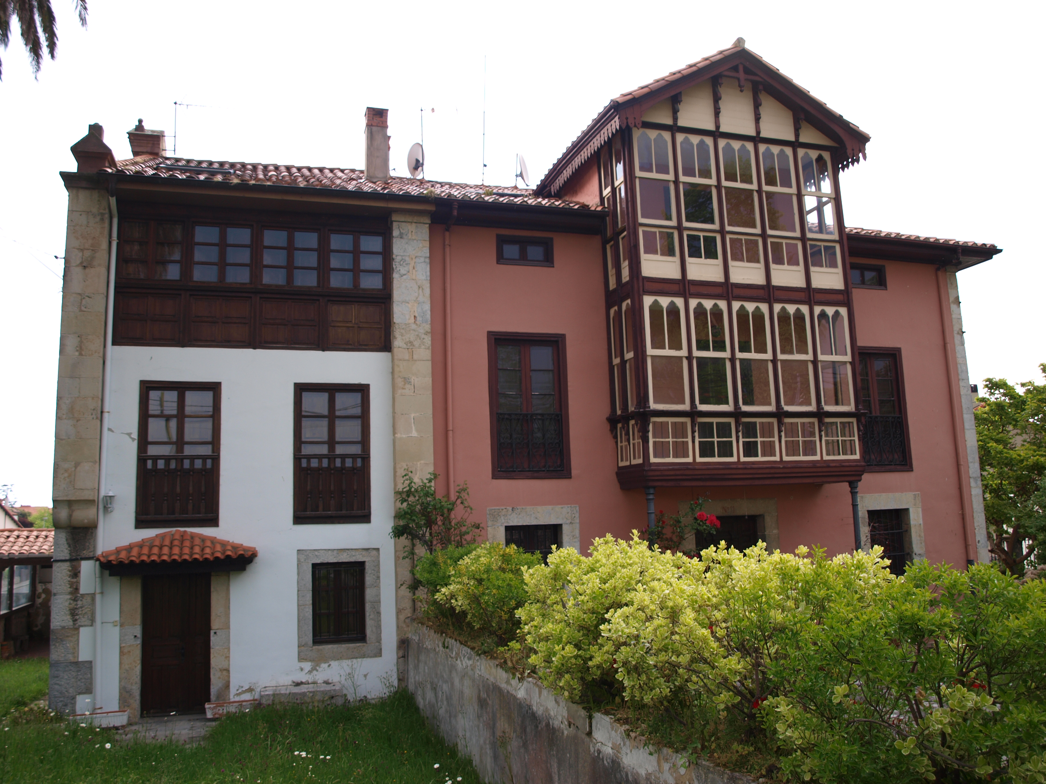 Fotos de colombres